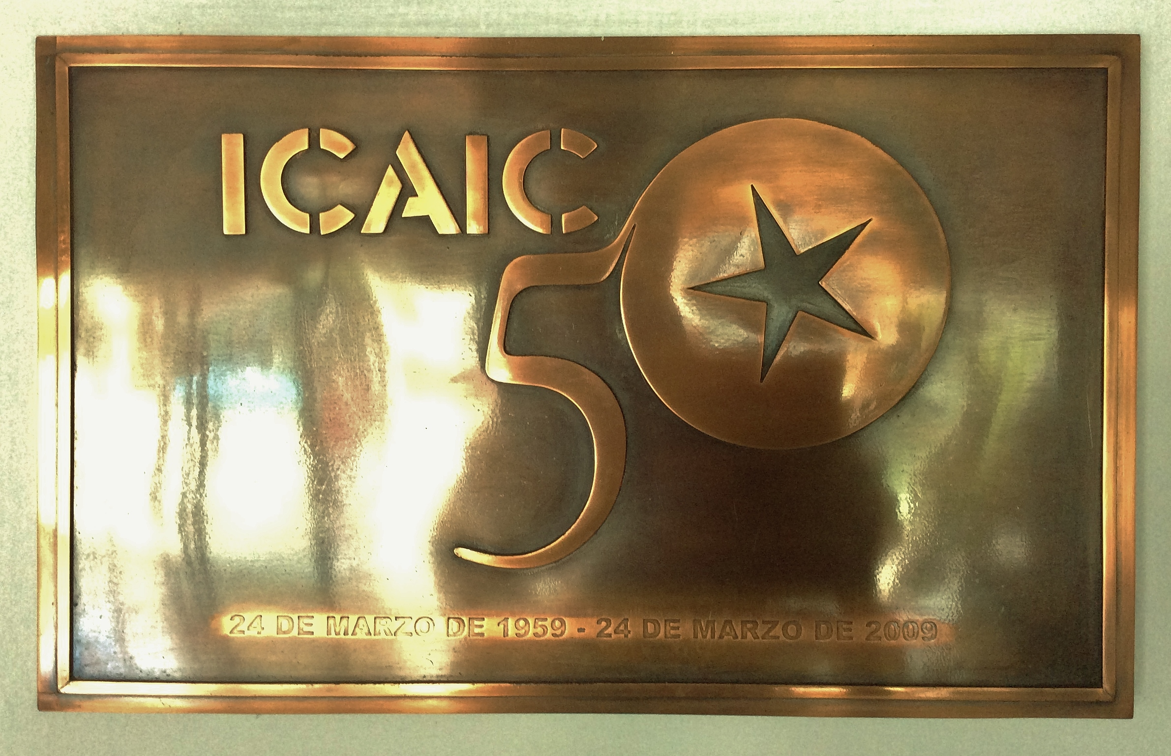 Logo del ICAIC por su 50 aniversario